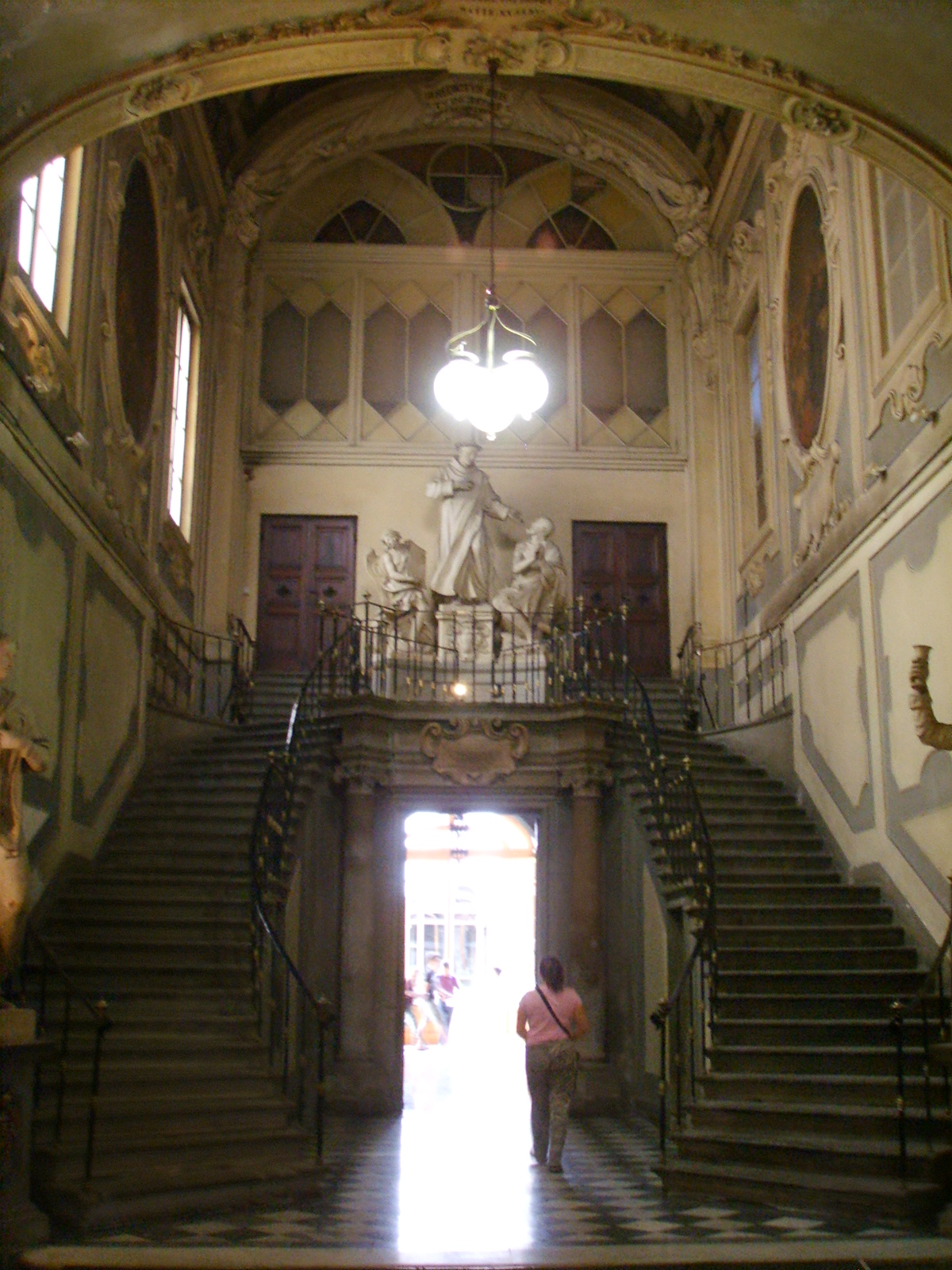 San Giovanni di Dio